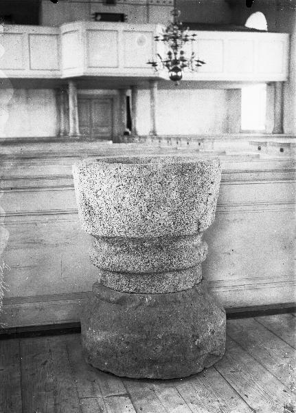 Dopfunt av sandsten, 1200-talet. Kategori: (04) DopfuntarDopfunt av sandsten, 1200-talet.